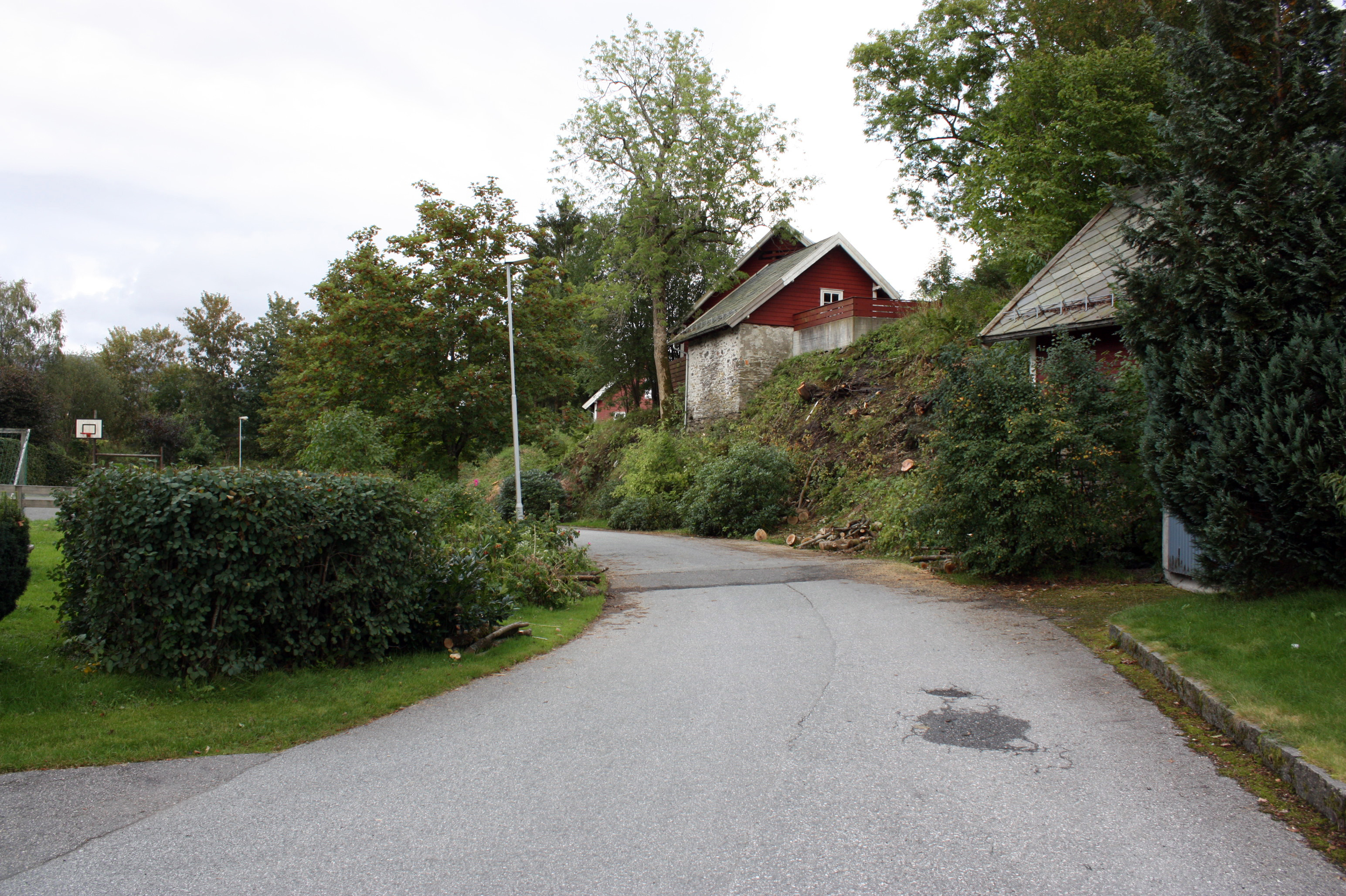 Marmorneset, Fana, Bergen.